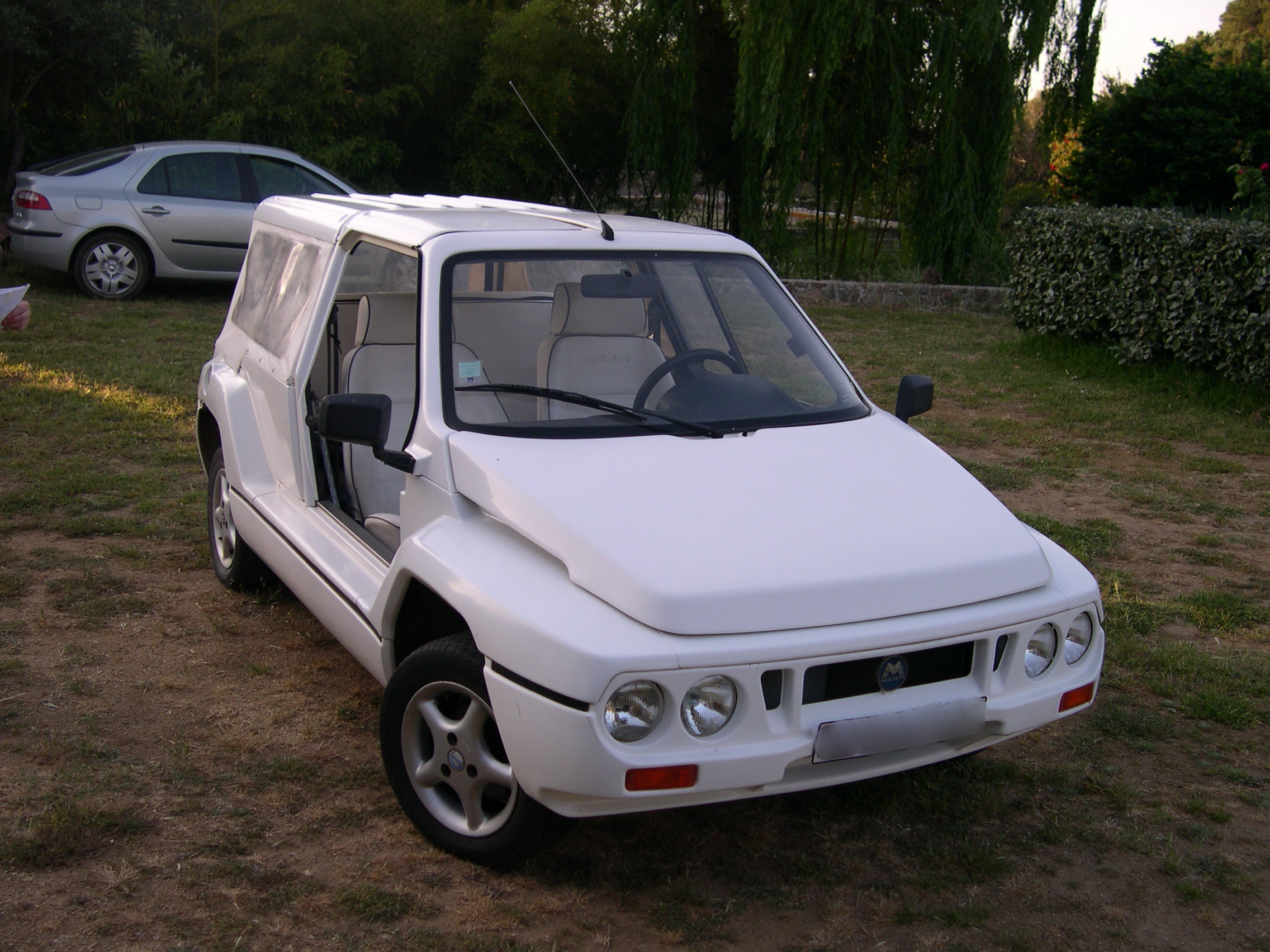 Mega Club, avec toit et bâches mais sans les portes.